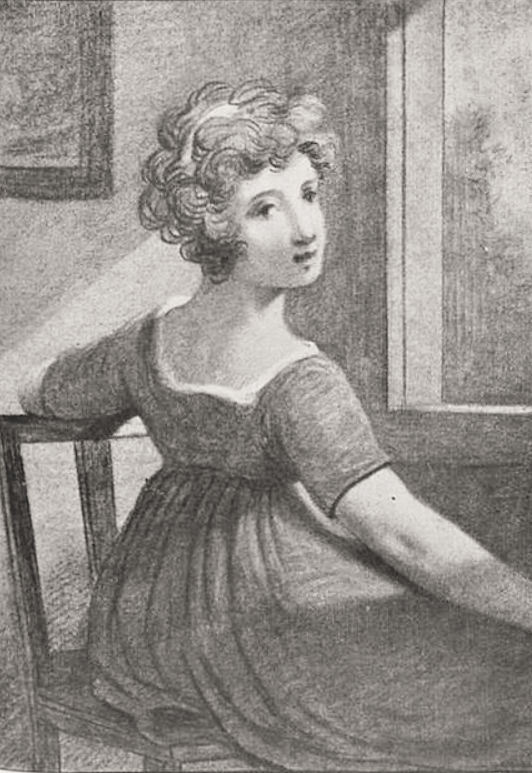 Pastelportret van Cornelia Aletta van Hulst door haar grootvader Jurriaan Andriessen.